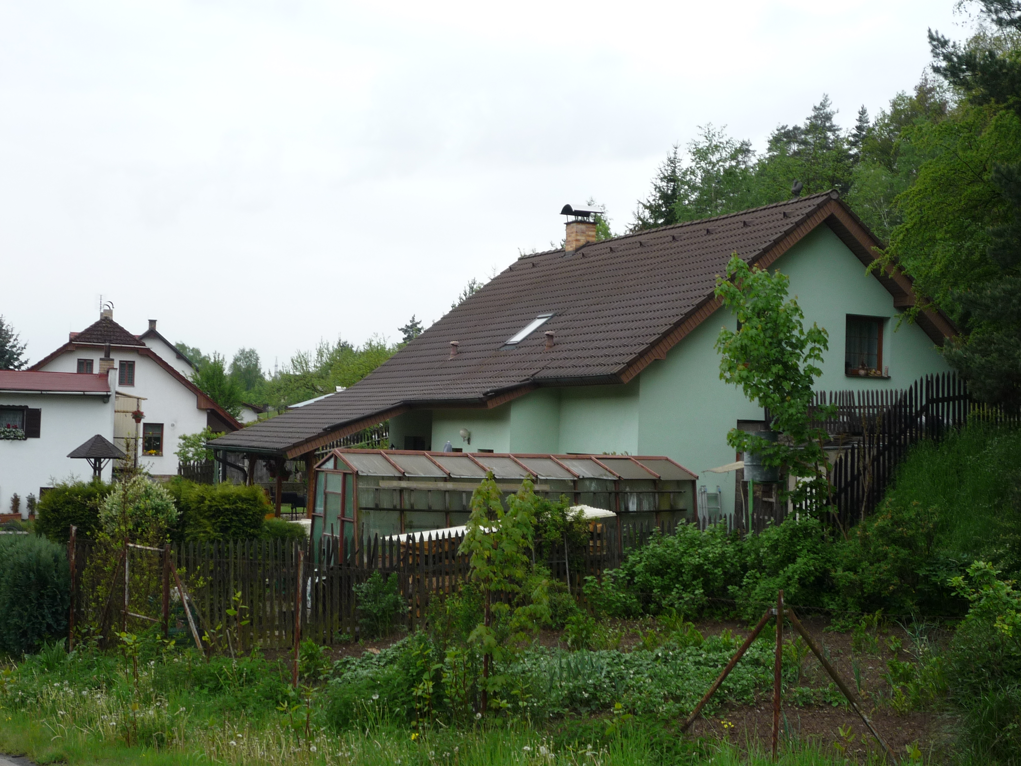 Autor fotografie Jiří Zelenka. Toulky vysočinou. Pohledští Dvořáci . Okr.Havlíčkův Brod. Kraj Vysočina.